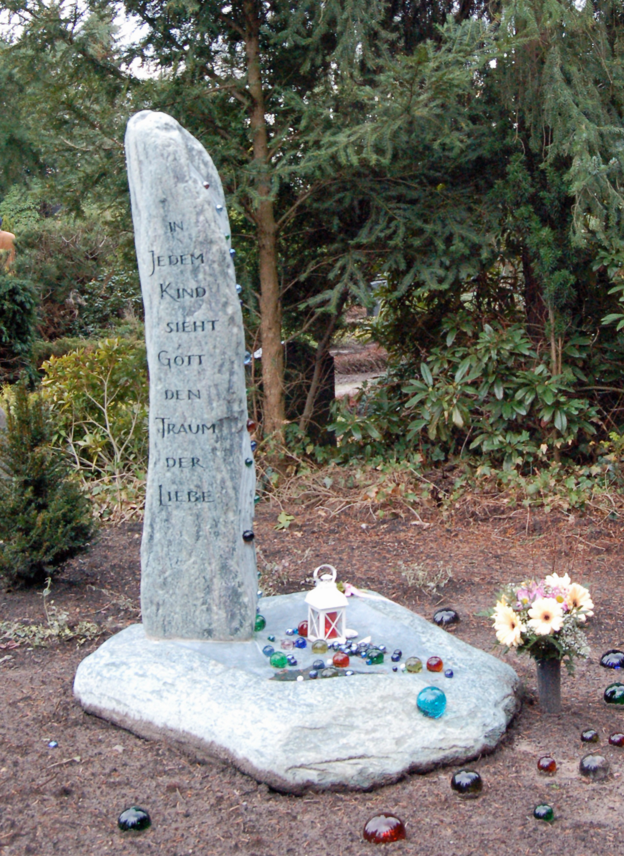 Der "Uetersener Kinderstein" ist ein besonderer Ort der Trauer. Wenn ein Kind tot geboren wird oder bei einem Schwangerschaftsabbruch abgetrieben wird, gibt es oft kein Grab, an dem getrauert werden kann. Die Trauer um verstorbene oder verlorene Kinder ist schwer. Aber besonders schwer ist es, wenn es keinen Ort gibt, an dem getrauert werden kann. Er stammt von der Seinmetzin Josephine Peters-Busdorff aus Puls/Schlweswig-Holstein.